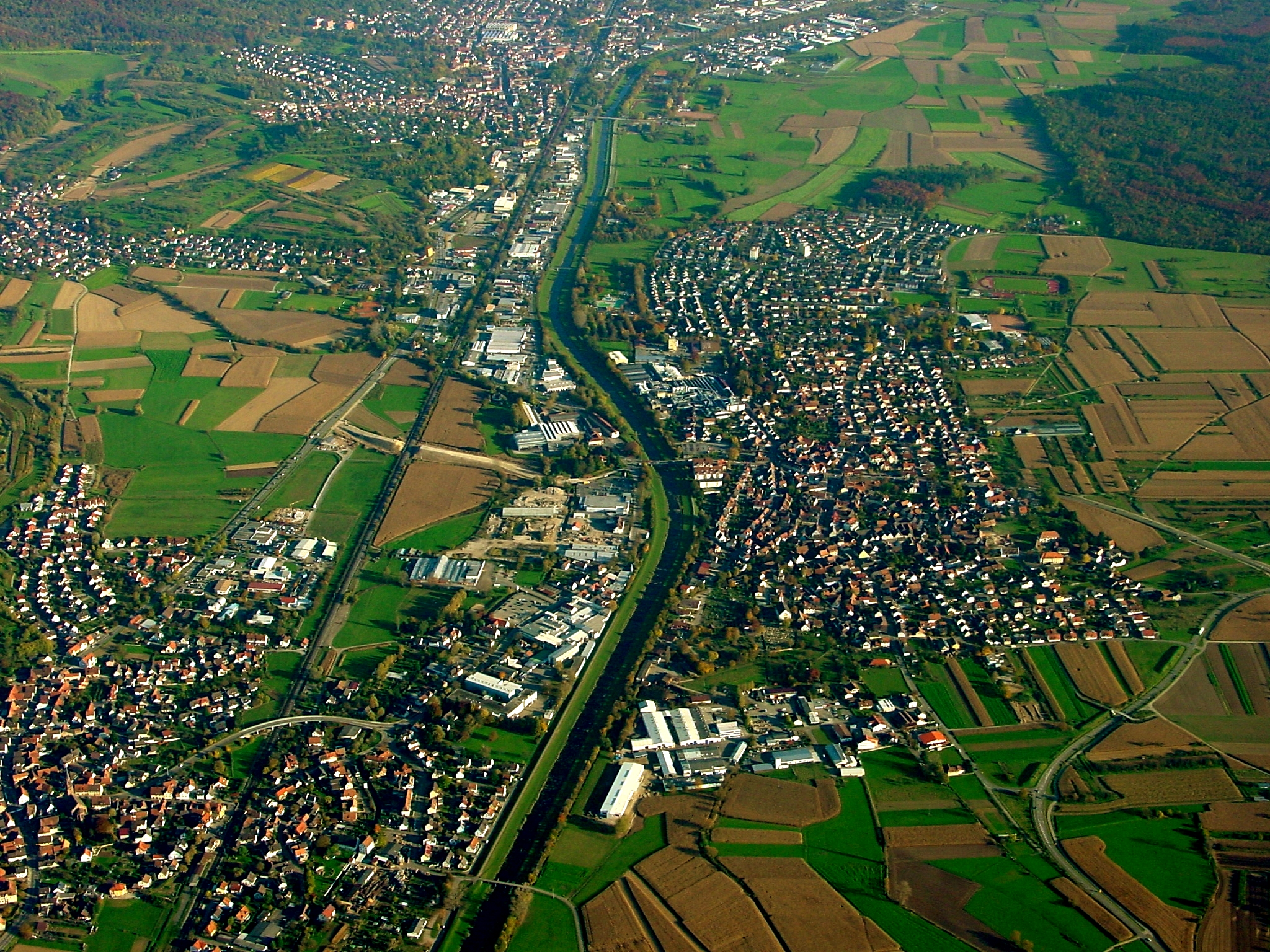 Luftbild von Teningen aufgenommen bei einer Ballonfahrt